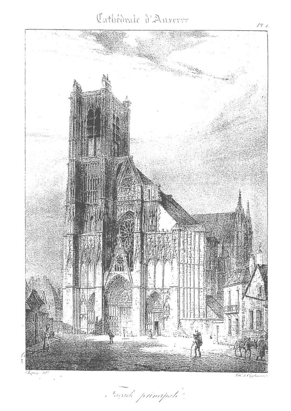 dessin de la cathédrale Saint-Étienne d'Auxerre par Chapuy